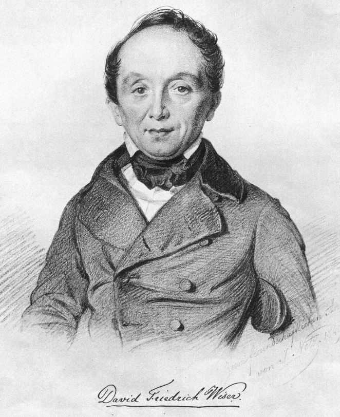 David Friedrich (1802—1878), Schweizer Mineraloge Bildunterschrift: Zum freundschaftlichen Andenken. Von I. Notz 1849 Lichtdruck: Polygraphisches Institut A.-G., Zürich